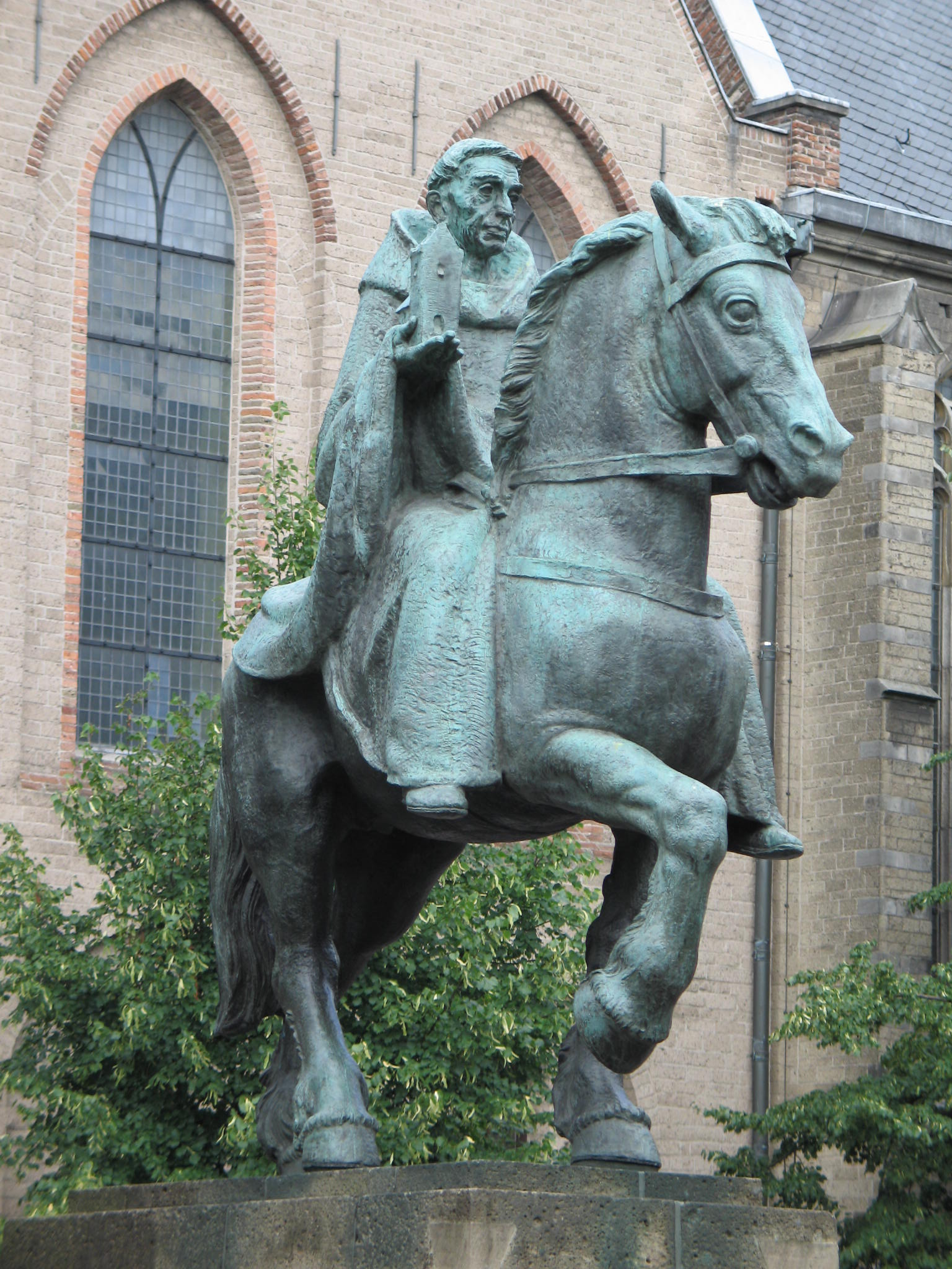 Ruiterstandbeeld van Sint Willibrordus (1939-1942), Janskerkhof (Utrecht). Gemaakt door de Nederlandse beeldhouwer Albert Termote (1889-1978)